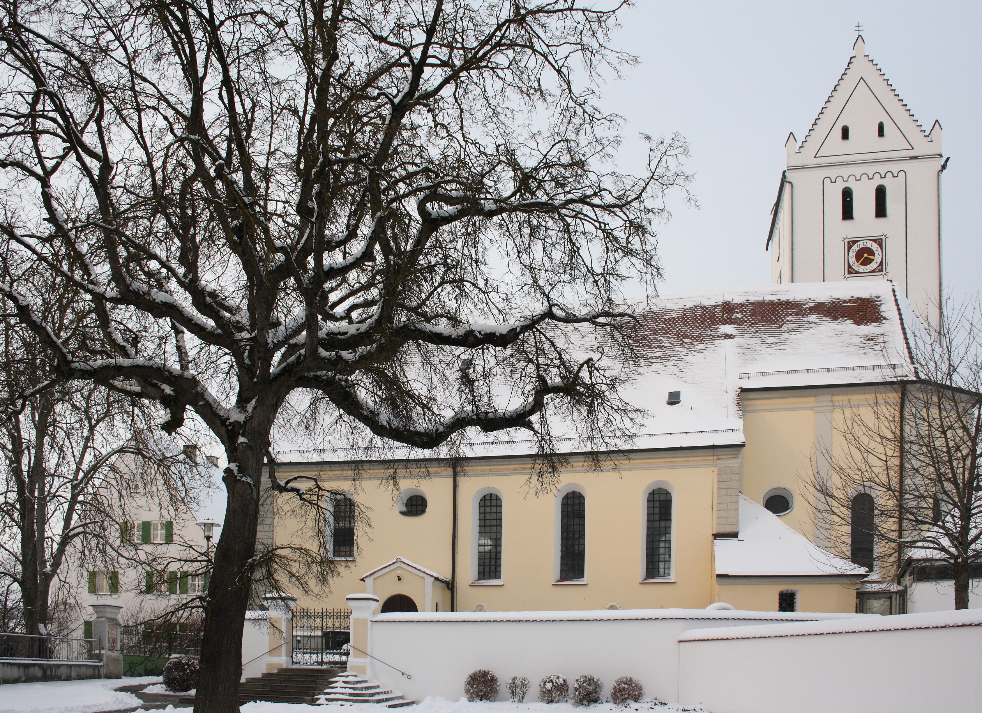 Katholische Pfarrkirche St. Martin in Mörslingen, einem Ortsteil der Gemeinde Finningen im Landkreis Dillingen an der Donau (Bayern)